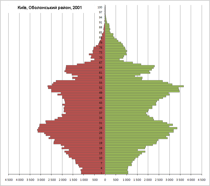 Статево-вікова піраміда населення Оболонського району Києва за переписом 2001 р.